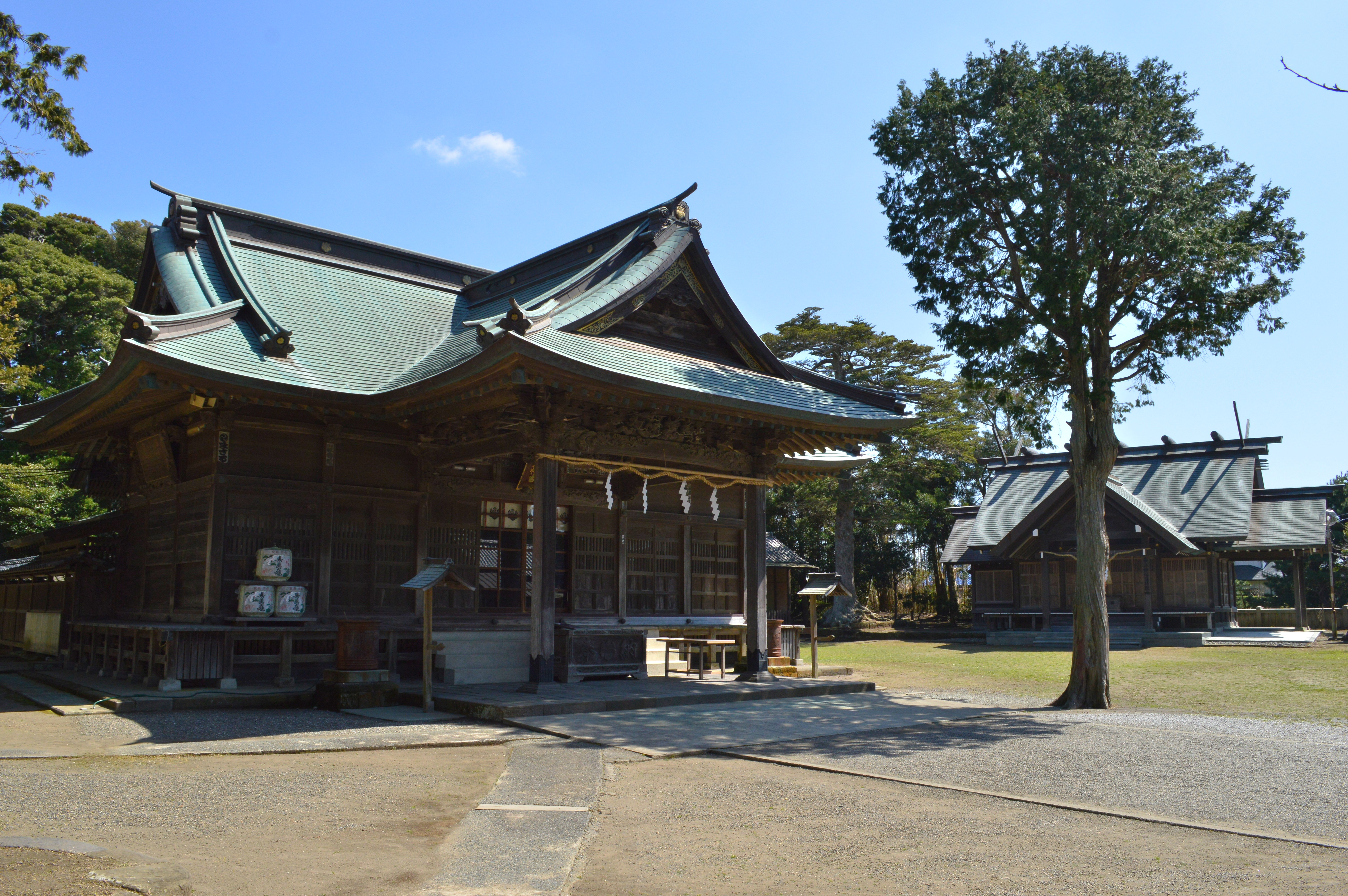 鶴谷八幡宮 拝殿と安房神社遥拝所